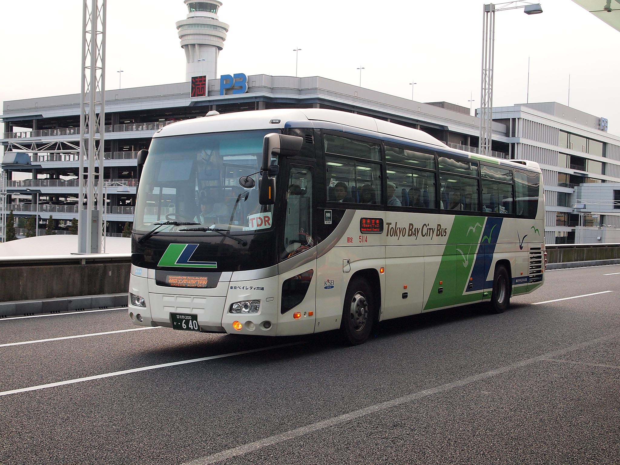 東京ベイシティ交通のいすゞガーラHD。羽田空港・成田空港・東京駅・川越・いわきから東京ディズニーリゾートおよび浦安市域を結ぶ高速バスや空港リムジンに就役する。写真の車両は後年京成グループ共通色に変更され、2016年現在は京成トランジットバスM610号車として在籍。 型式：PKG-RU1ESAJ 登録番号：習志野200か・640 撮影地：東京都大田区、東京国際空港